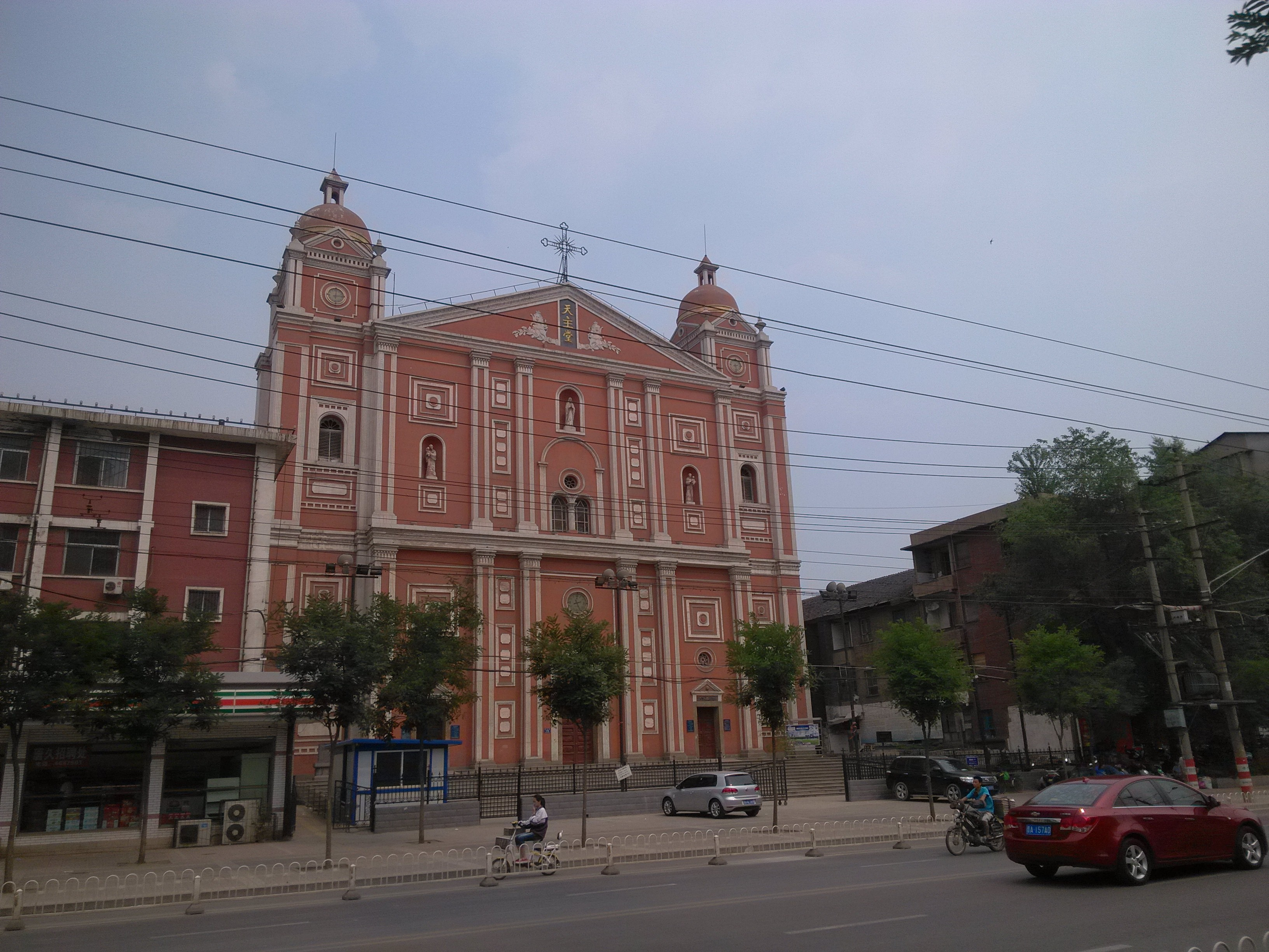 太原圣母无染原罪主教座堂。